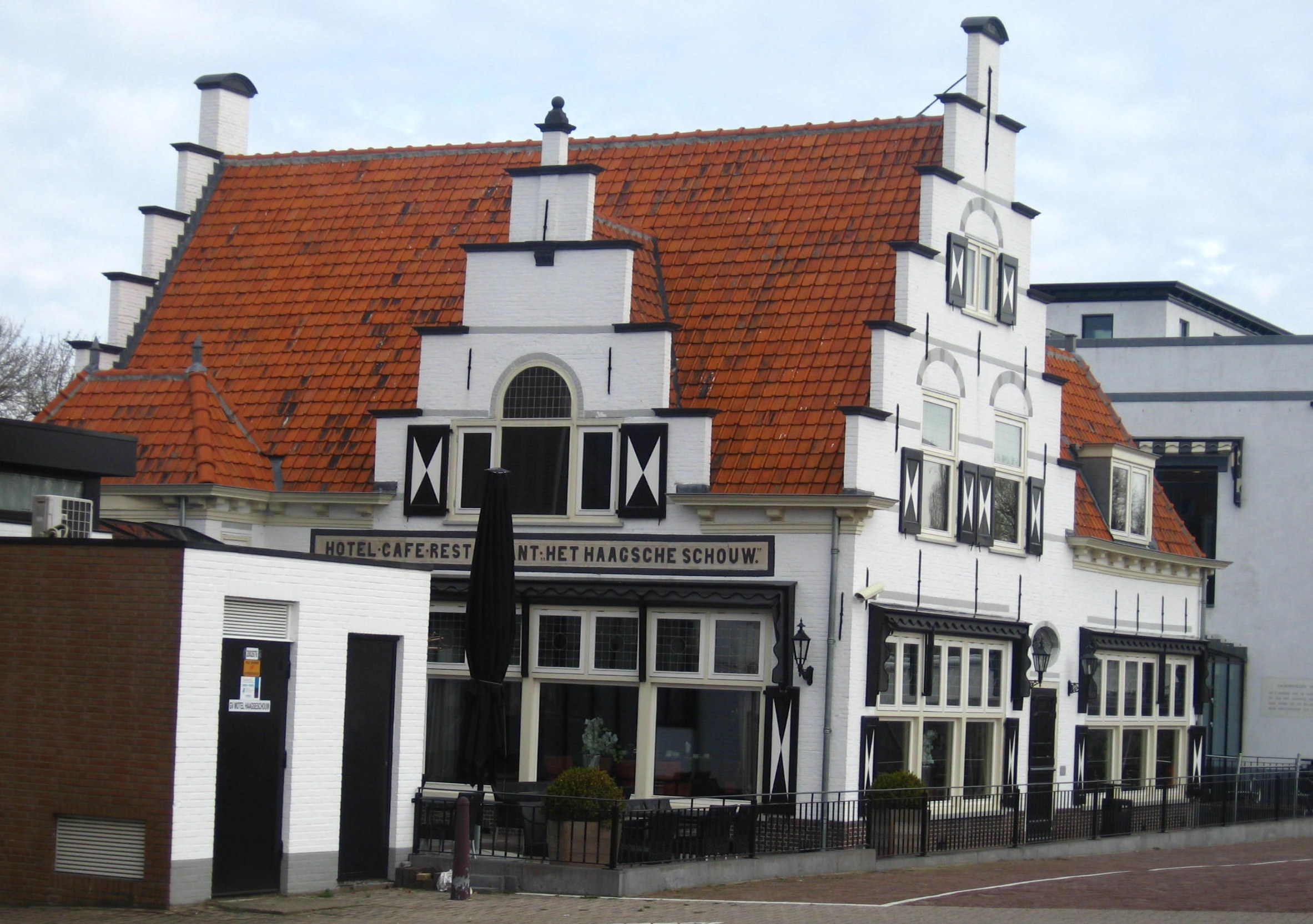 Het Haaagsche Schouw